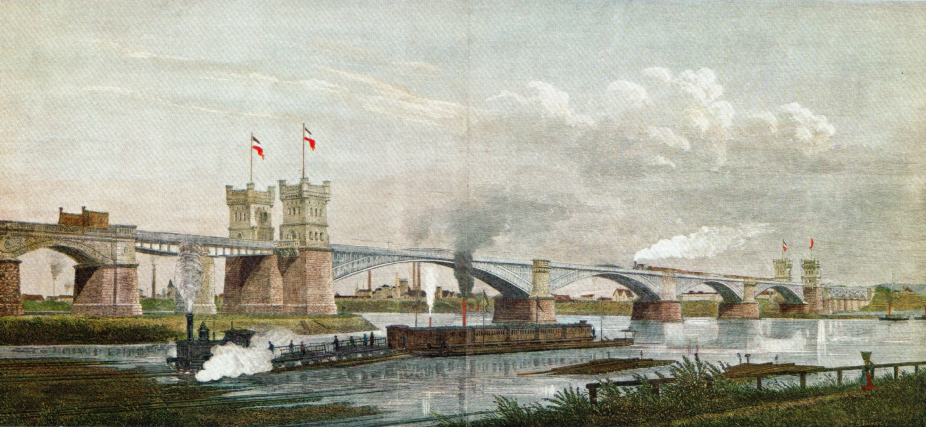 Im Vordergrund ein Trajektschiff der Rheinischen Eisenbahn mit Personenwagen. Dahinter die neue Rheinbrücke Rheinhausen - Duisburg-Hochfeld mit einem Güterzug Anfang Januar 1874. Hinter der Brücke Hochfelder Industriewerke.